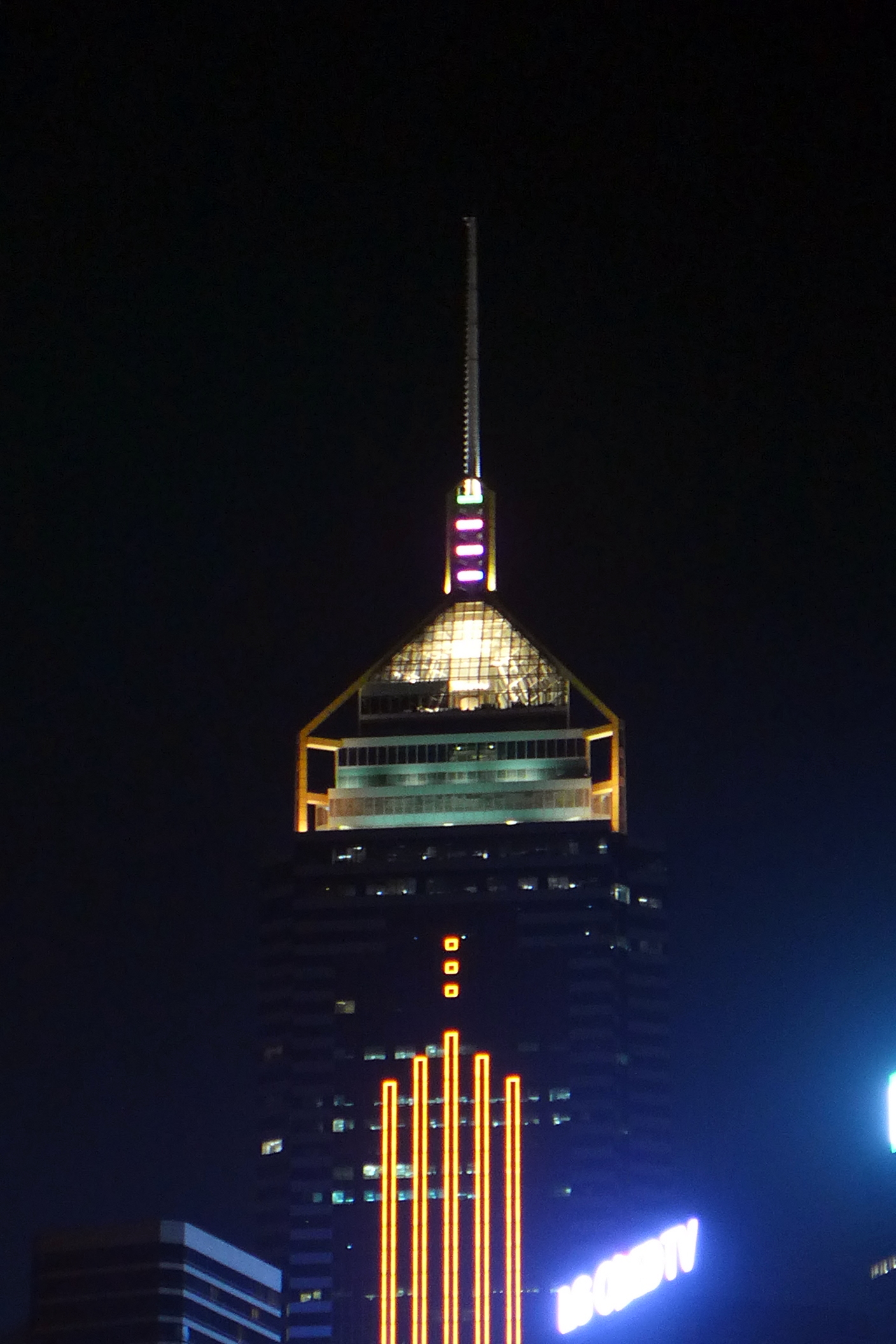 Central Plaza Light time view